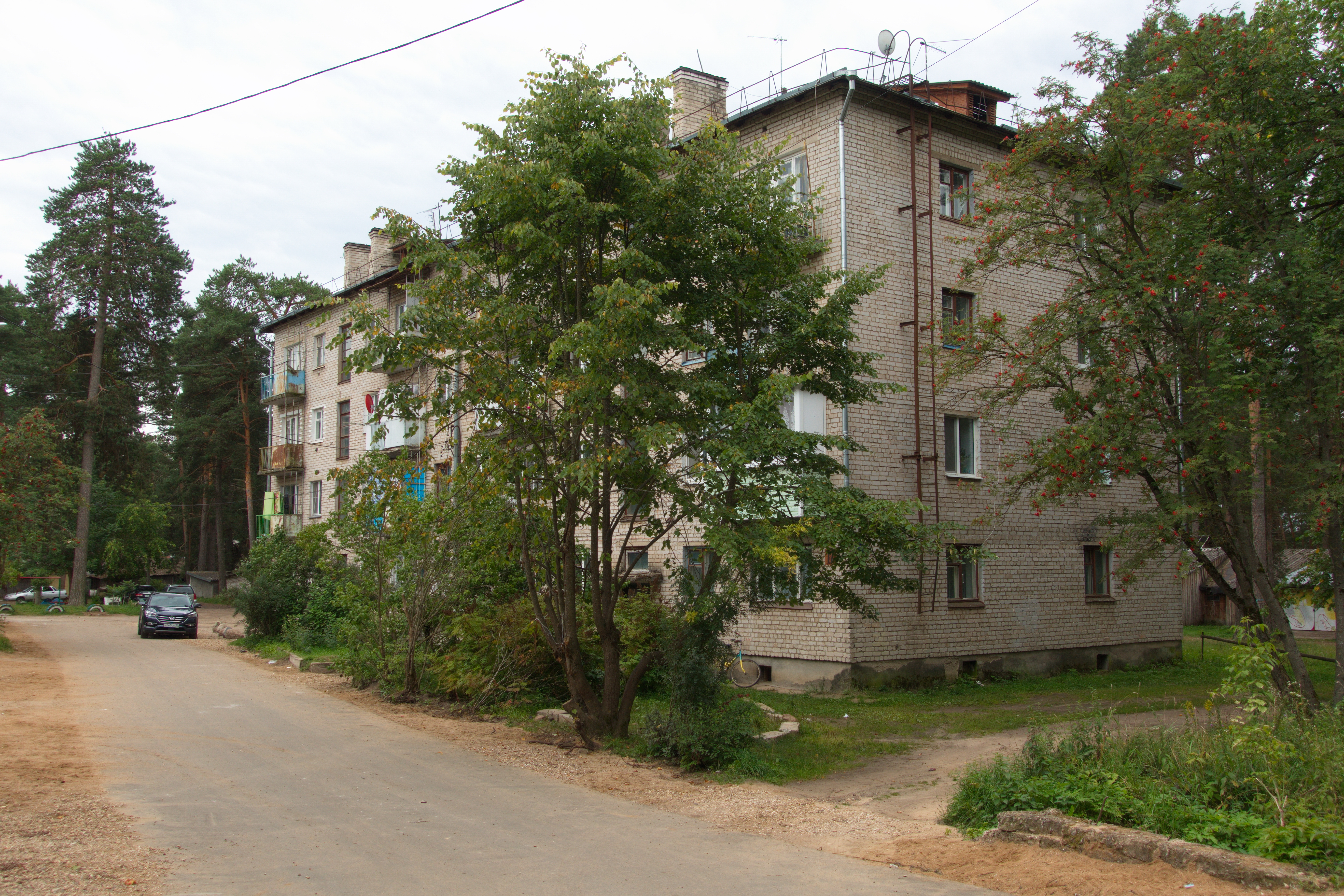 Посёлок Зелёный, Торжокский район Тверской области. Жилой дом №17, вид со стороны дороги